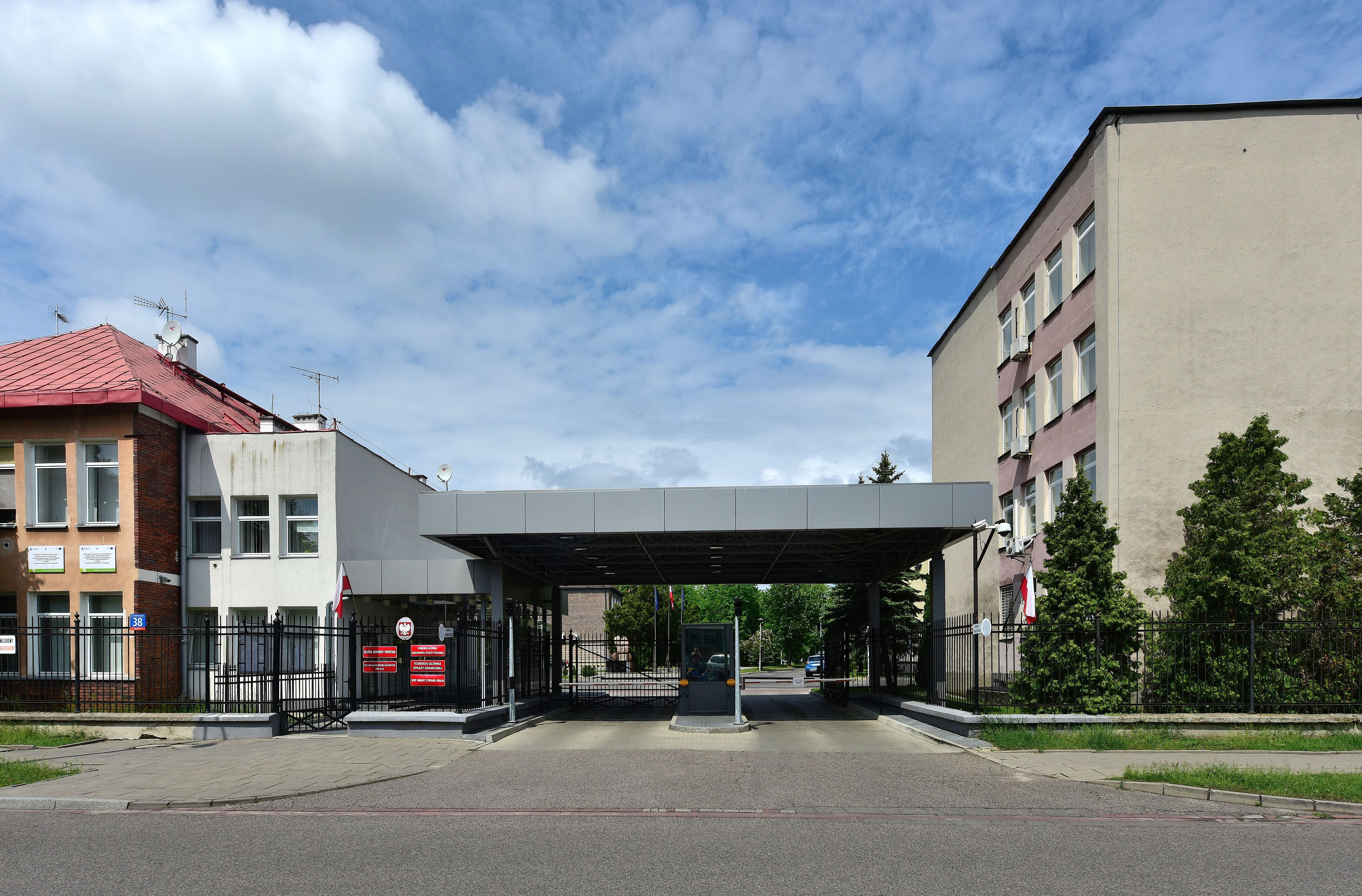 Kompleks budynków przy ul. Podchorążych 38 w Warszawie